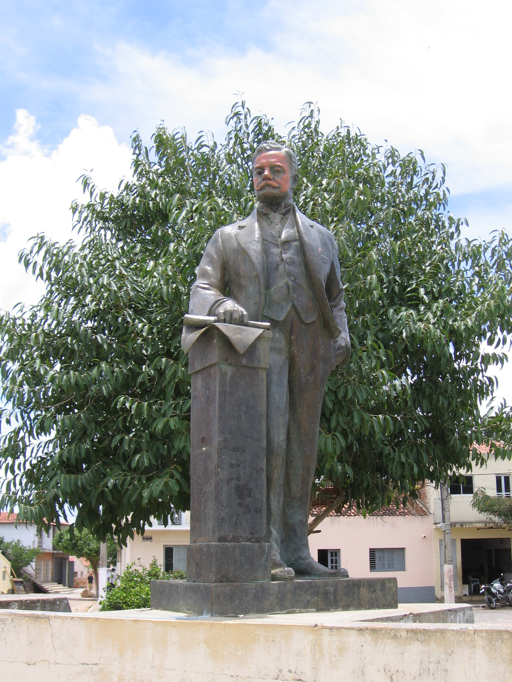 Estátua de Epitácio Pessoa, em Princesa Isabel.